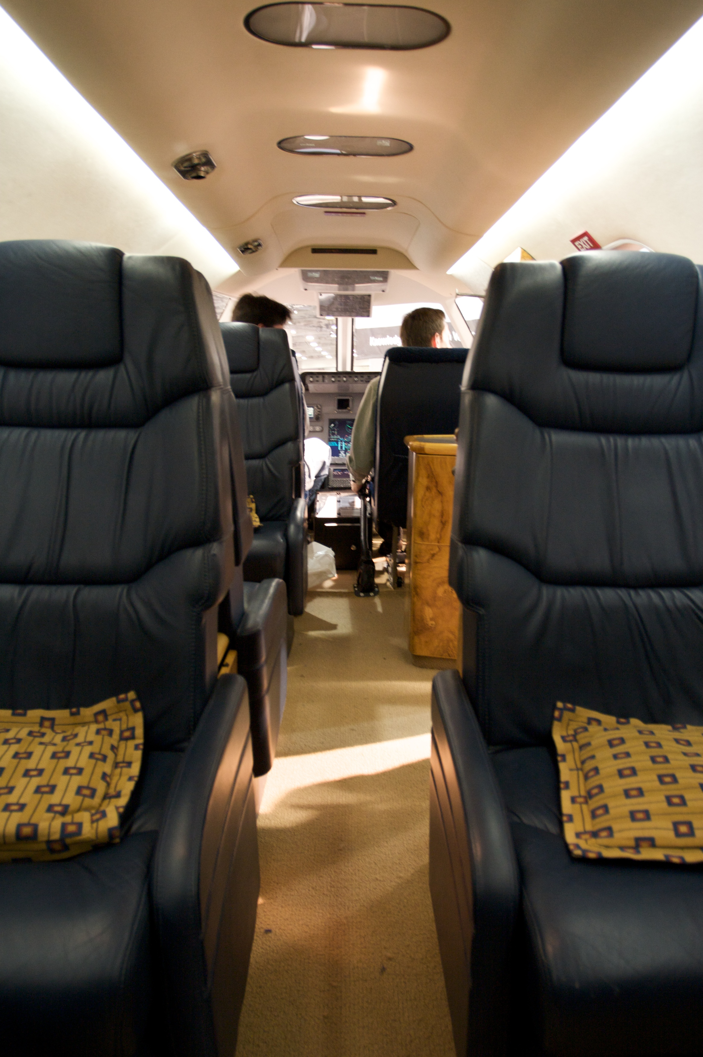 BA609 mockup cabin